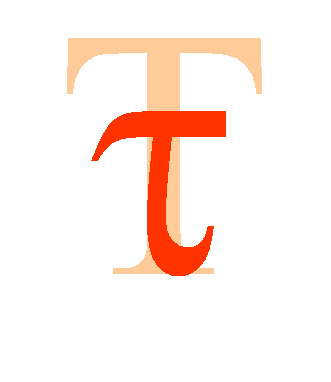 Greek letter